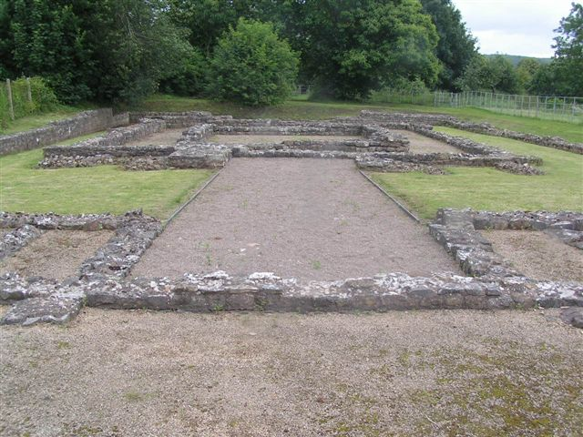 Caerwent Roman Temple